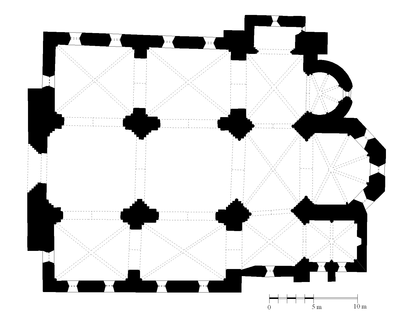 Plan de la Cathédrale Notre-Dame du Bourguet - Forcalquier (04)